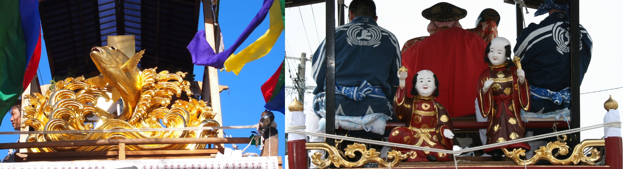 新田町見送り、上町見送り